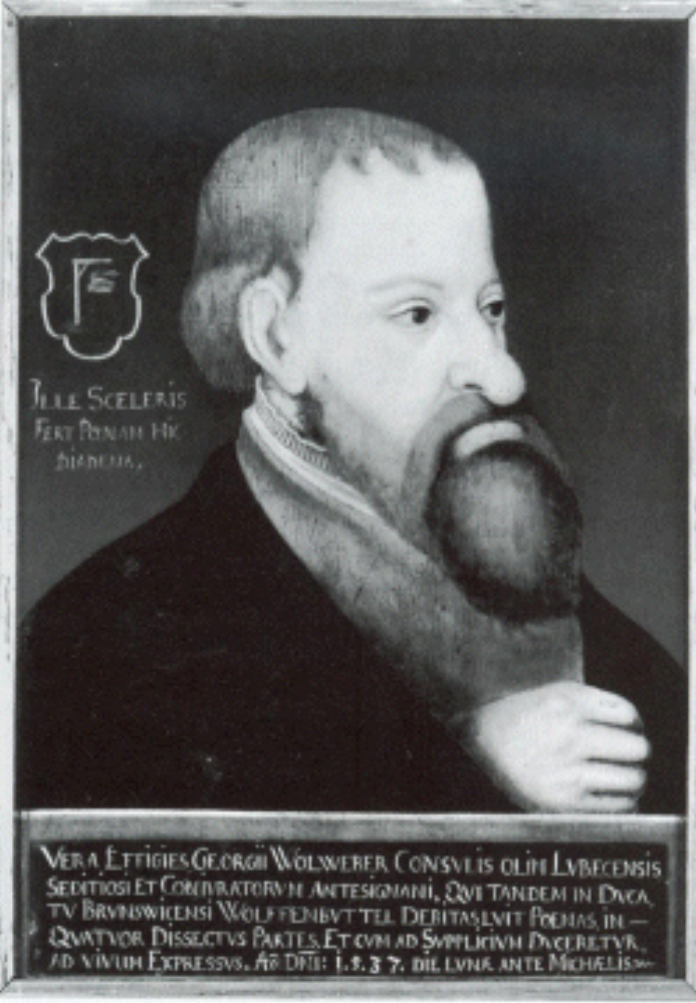 Jürgen Wullenwever, Lübecker Bürgermeister. Um 1537 entstandenes Spott-Porträt, lange im Besitz der Stadtbibliothek Lübeck, heute im St.-Annen-Museum ausgestellt